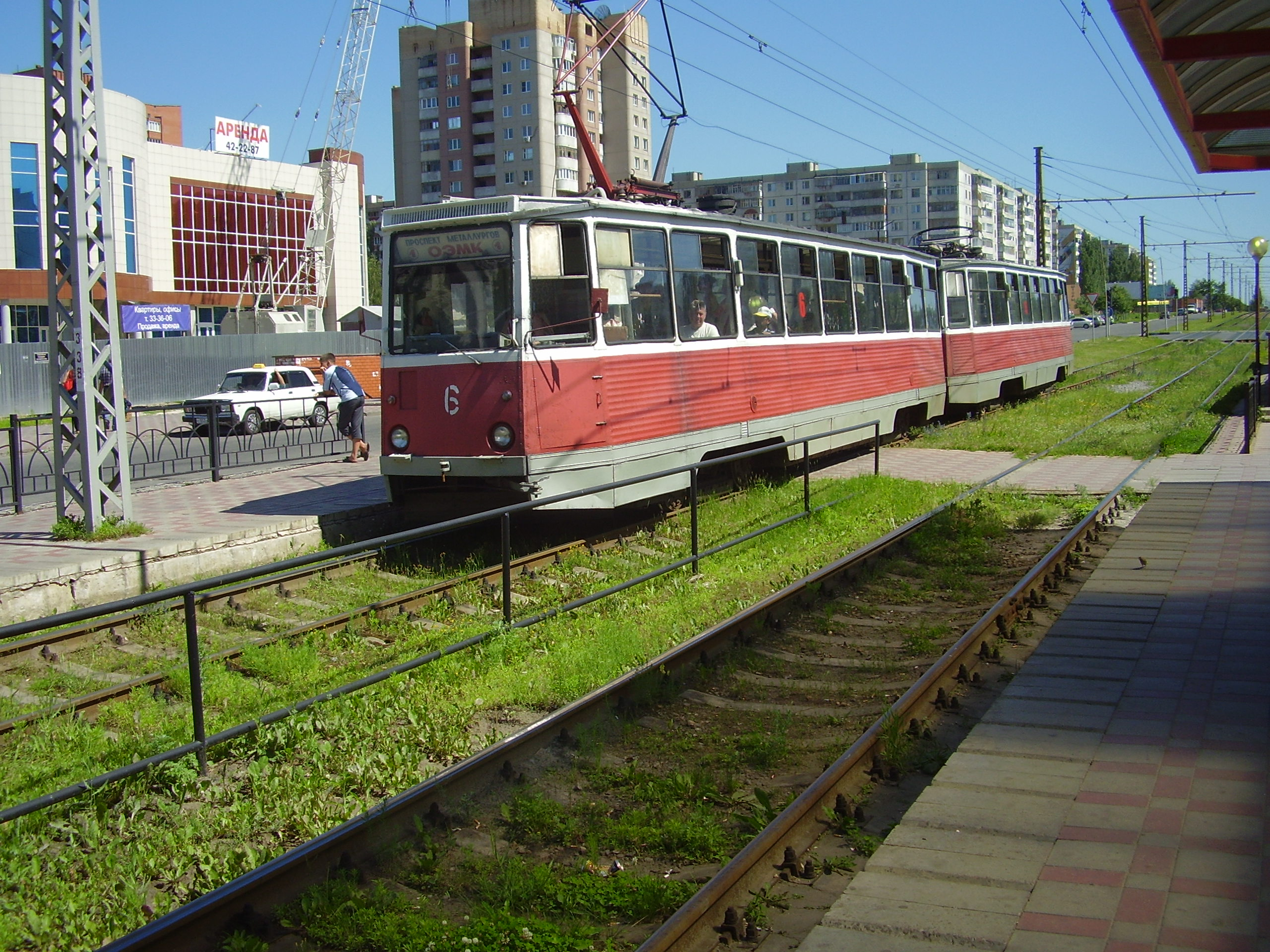 Старый Оскол. Городской трамвай